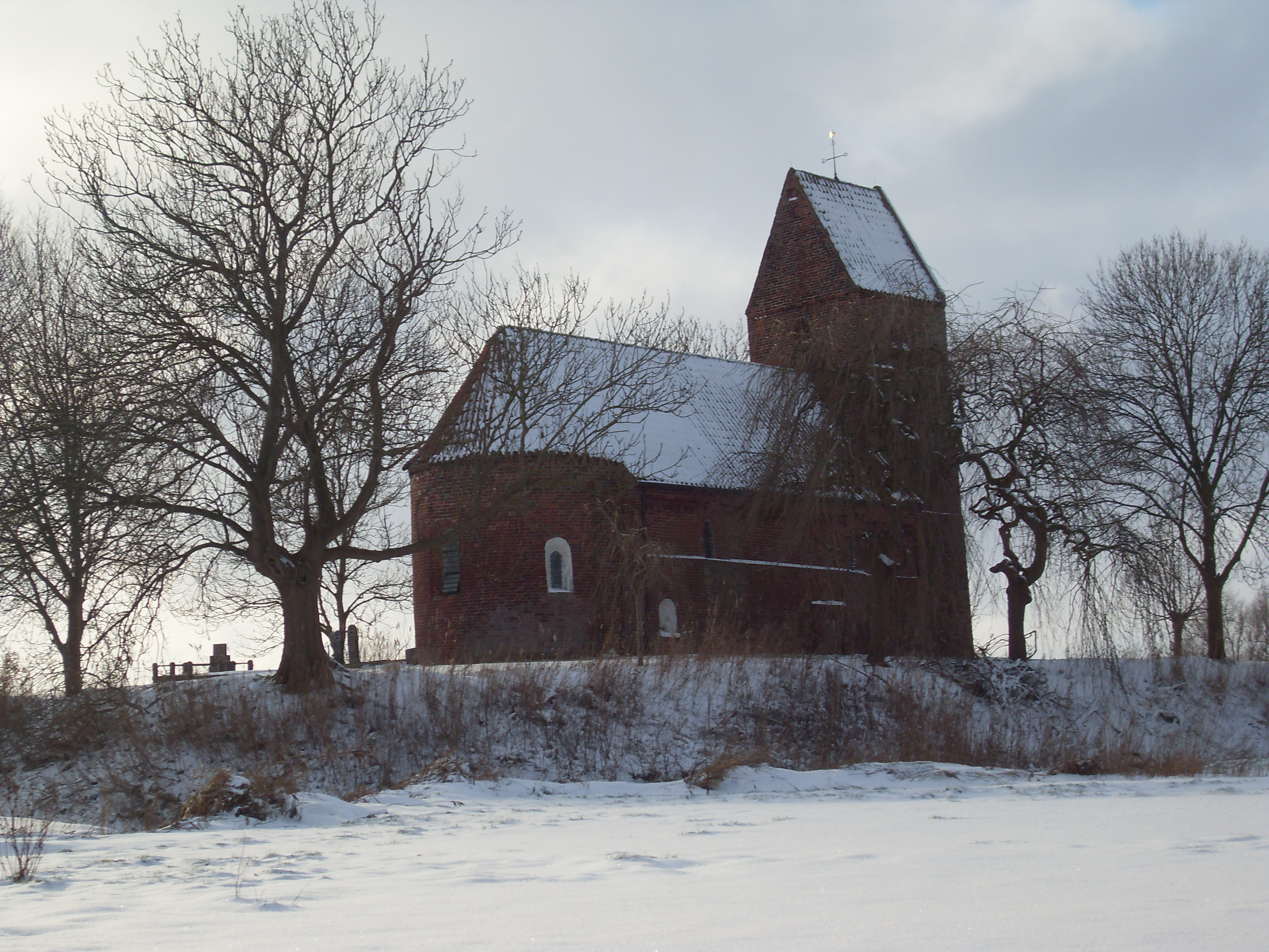 Dit is de Marsumerkerk vanaf de noordoostkant gefotografeerd. De kerk is gebouwd op een wierde in de 12e eeuw. Hij is gebouwd in Romaanse stijl en heeft z.g.n monniken en nonnen dakpannen. Het is één van de oudste kerken van Nederland. De kerk is gelegen in het midden van het wierdedorpje Marsum in de gemeente Appingedam.